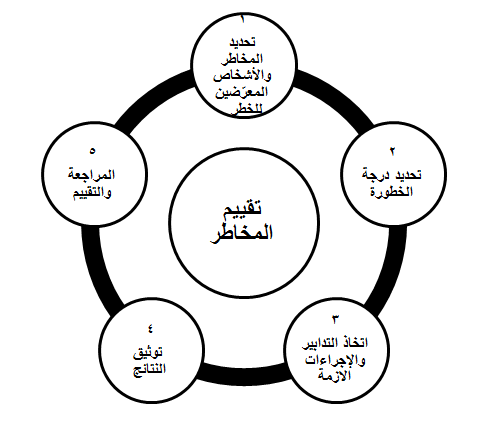 مستند يبين خطوات تقييم المخاطر